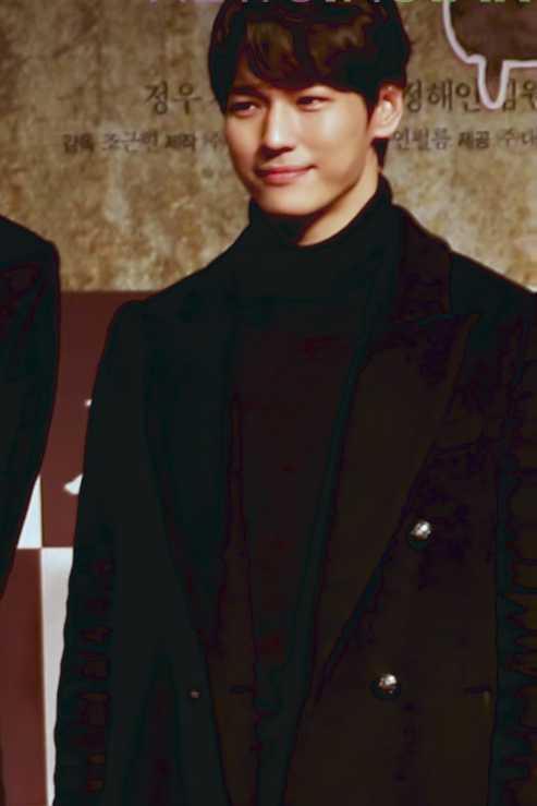 영화 '흥부' VIP시사회 포토월